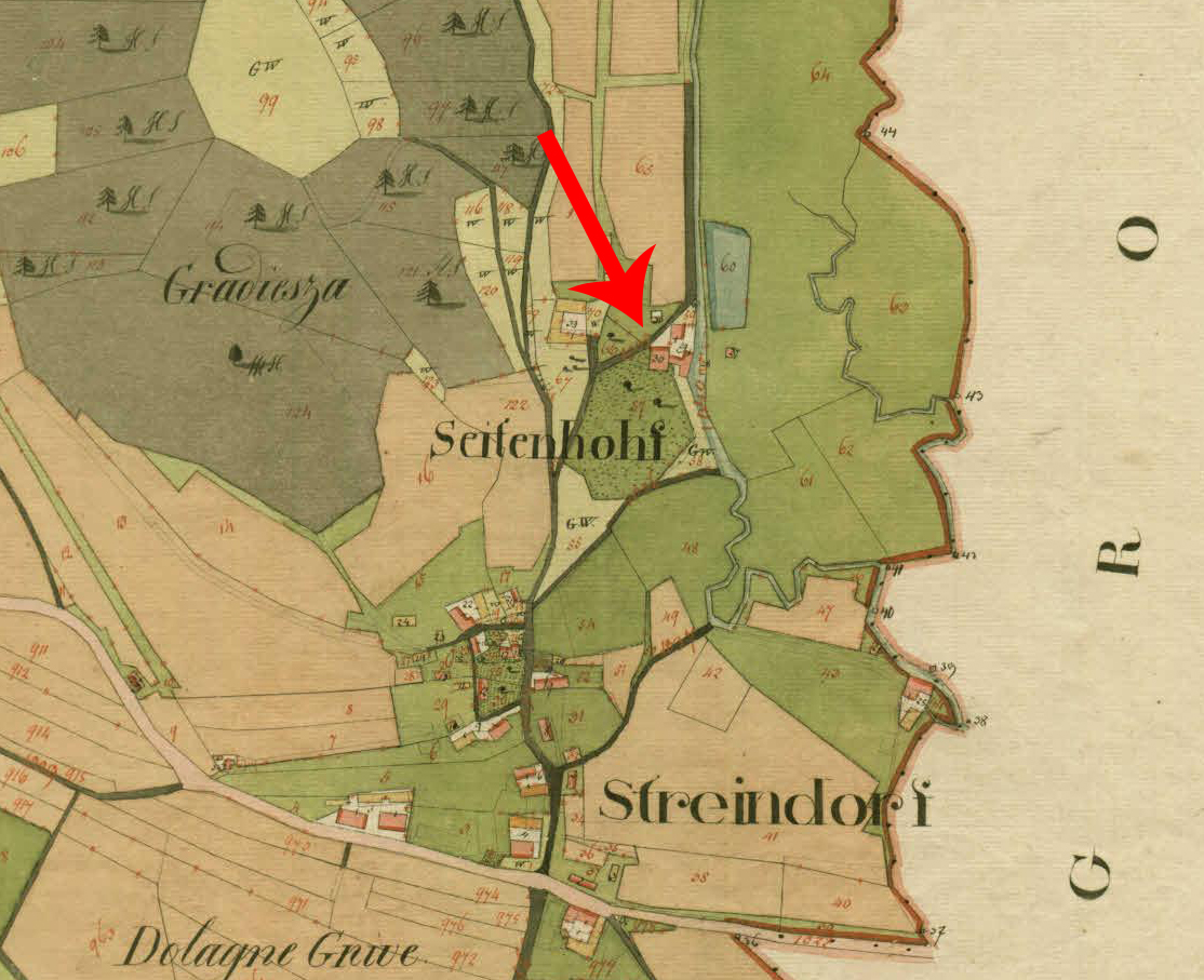 Franciscejski kataster za Kranjsko, 1823-1869